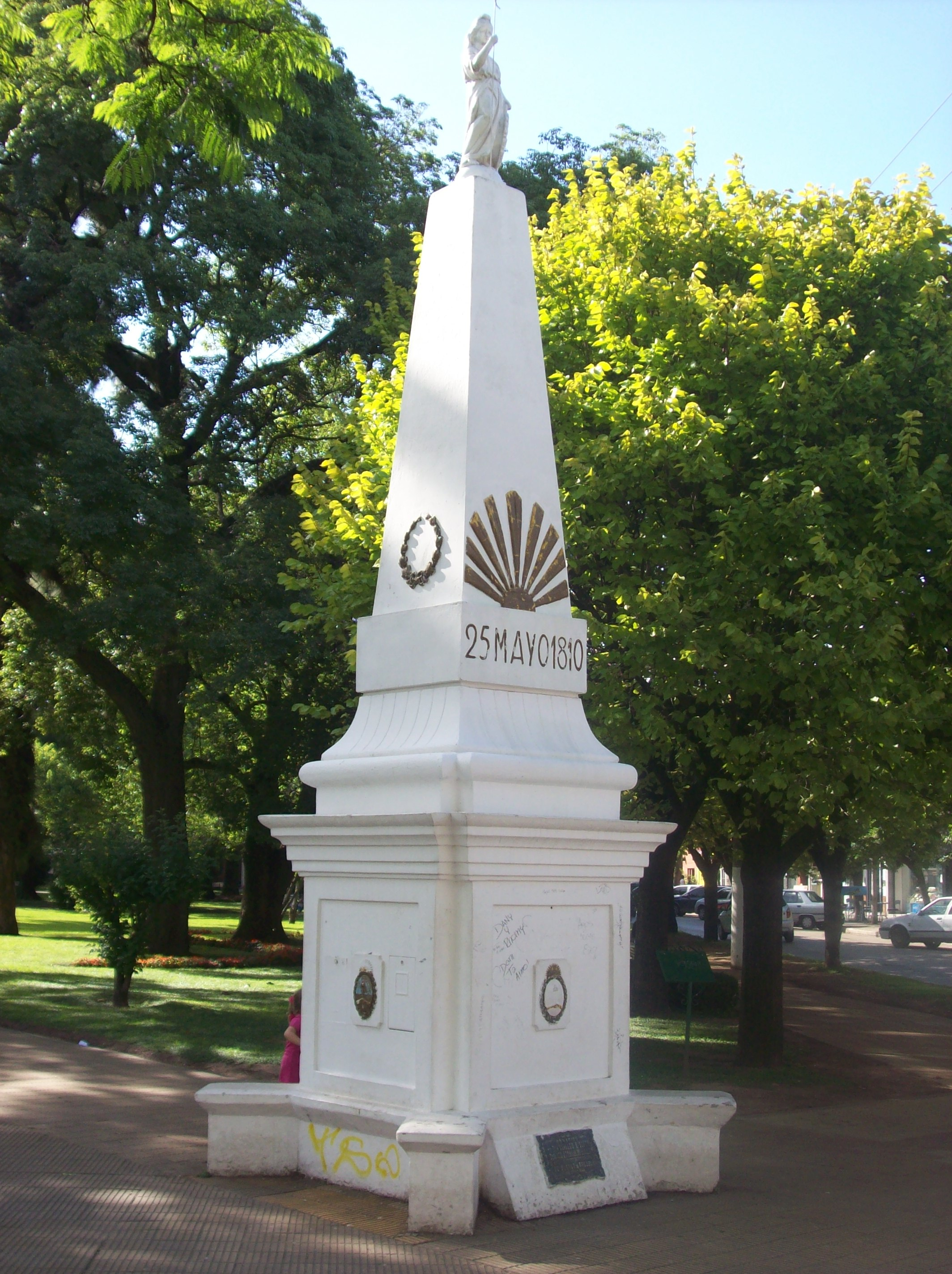 Reproducción de la Pirámide de Mayo en la Plaza General Don José de San Martín dentro de la ciudad de Belén de Escobar, partido de Escobar, provincia de Buenos Aires, Argentina. Esta réplica data de 1961.